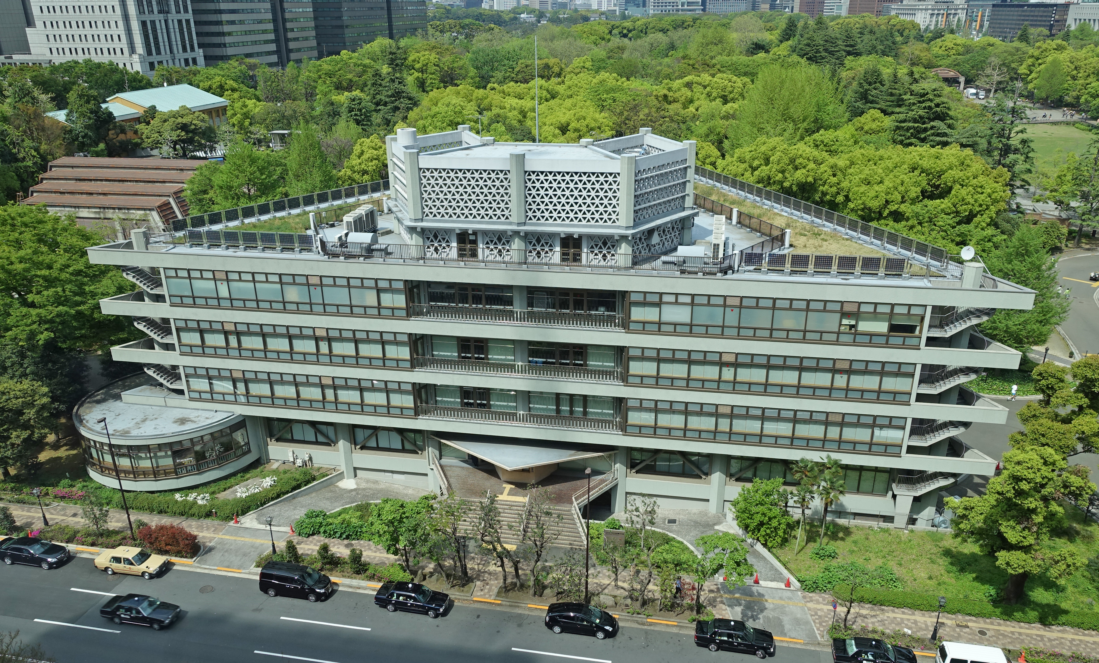 日比谷図書文化館（日本プレスセンタービルより撮影）